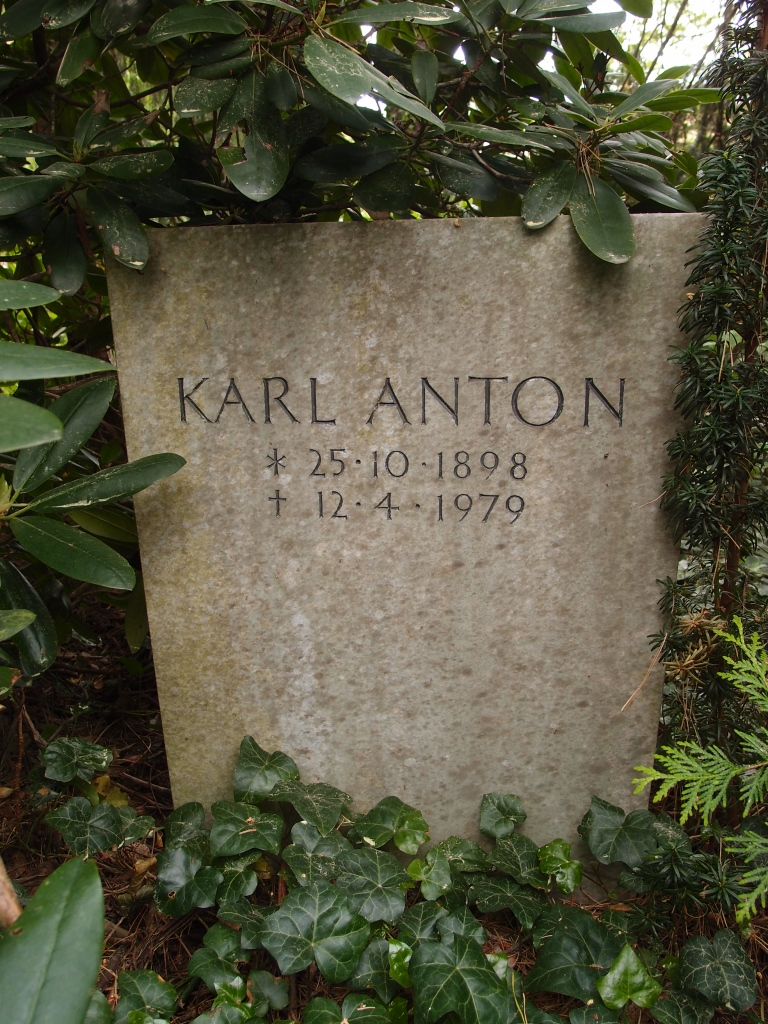 Grab des Filmregisseurs, Drehbuchautoren und Filmproduzenten Karl Anton (1898-1979) auf dem Waldfriedhof Dahlem in Berlin